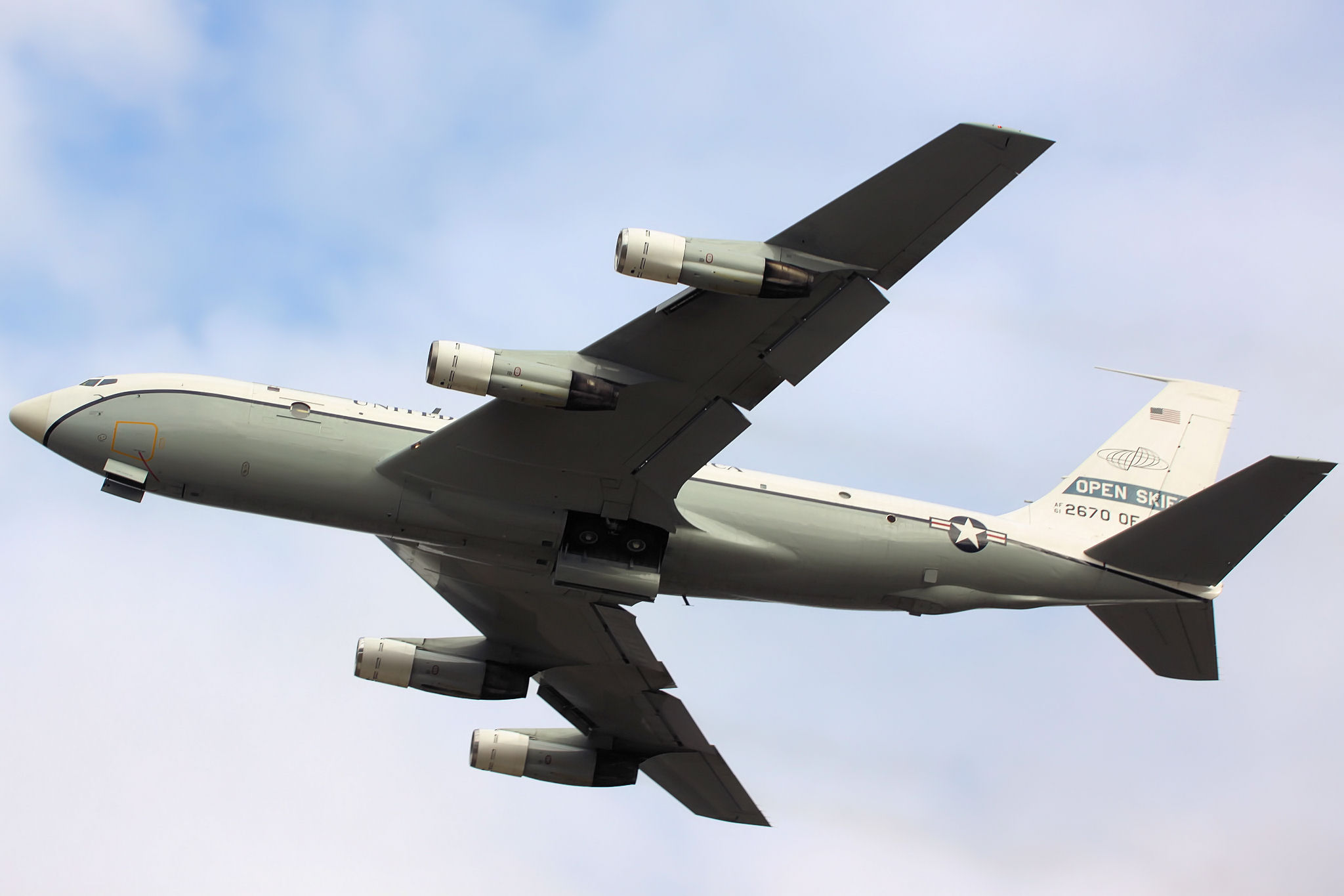 OC-135B Open Skies - RAF Mildenhall Feb 2010